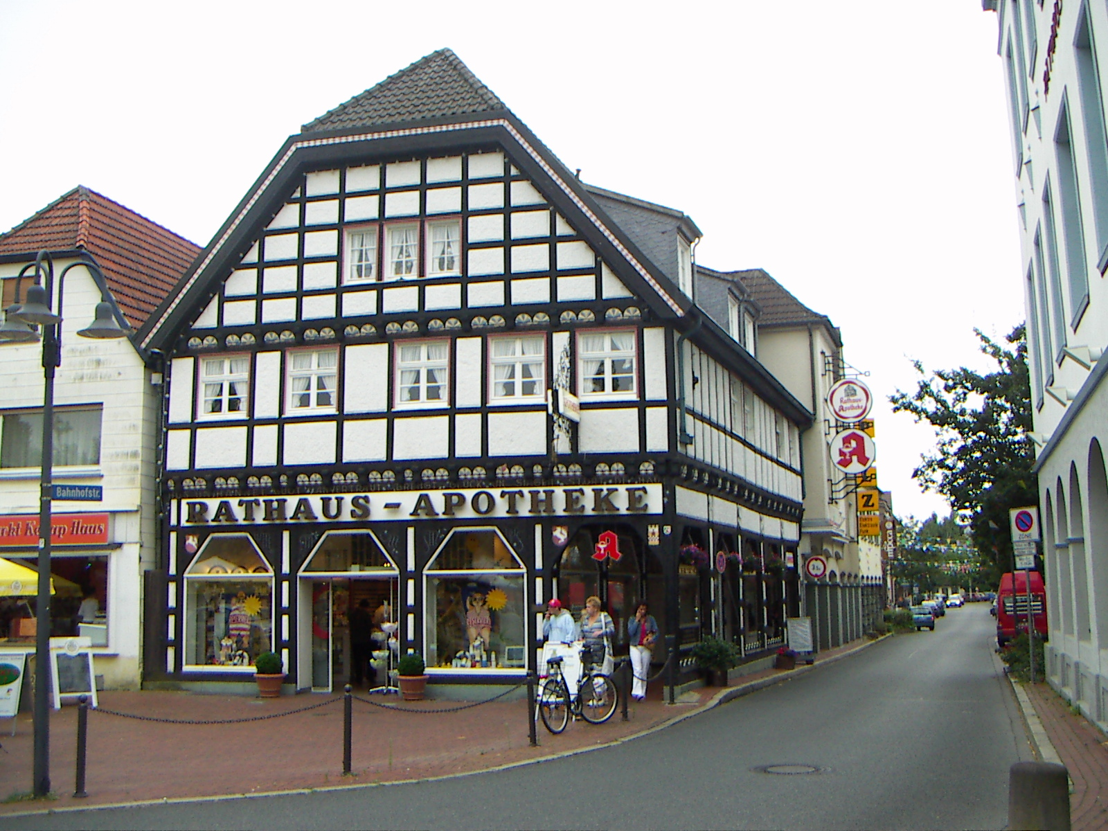 Rathausapotheke Kamen (Westf.)